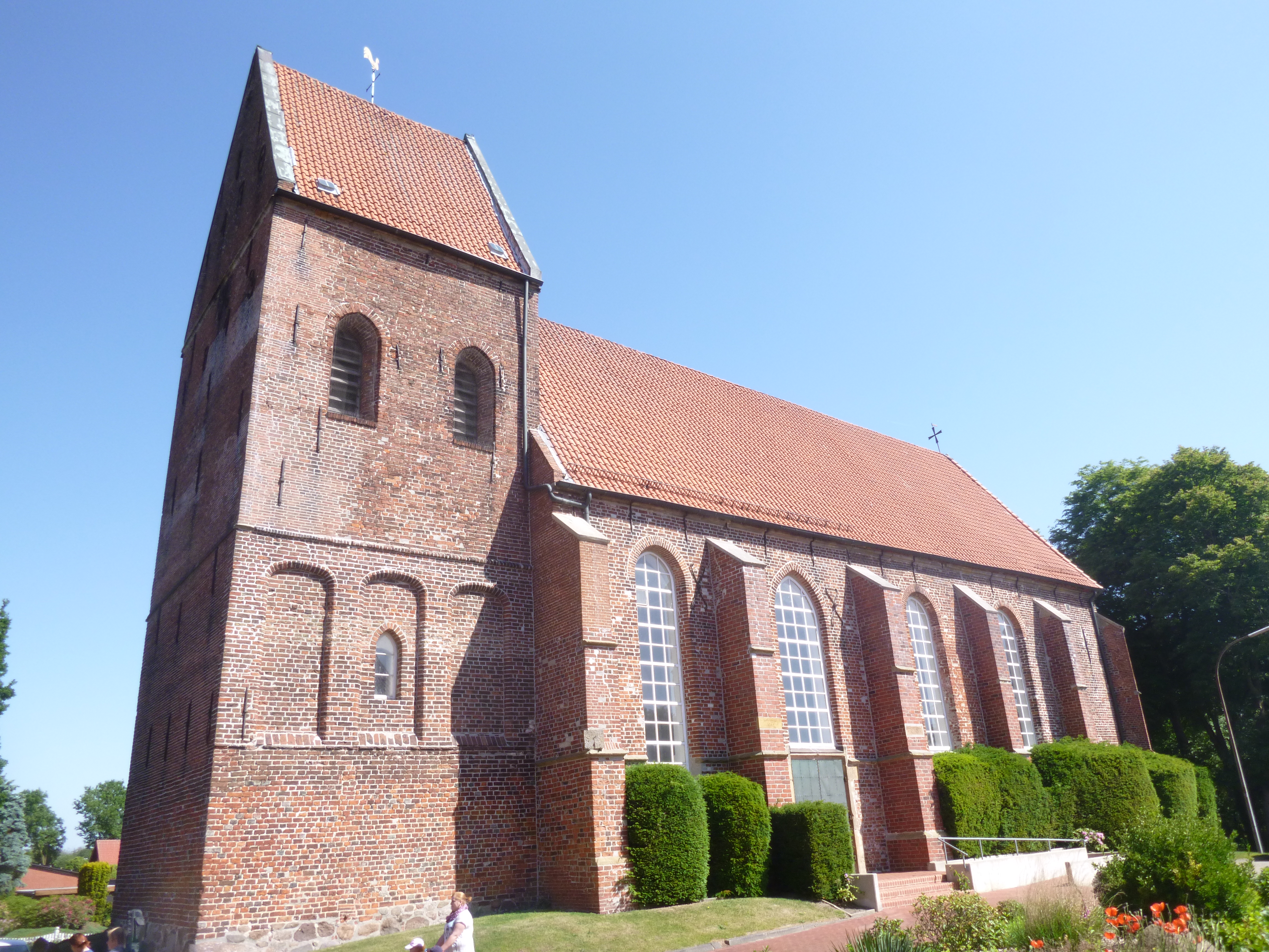 malnova kirko en Rhede, distrikto Emsland, GermanioEsperanto: Alte Rheder Kirche